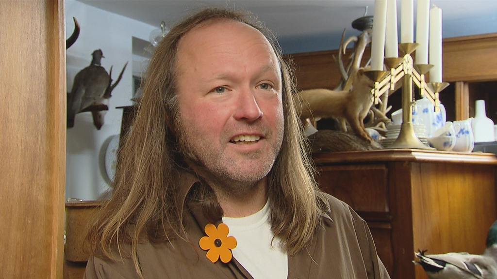 Markus Reinecke, der Trödelfuchs. In seinem Trödelladen in Wesseln, 2010